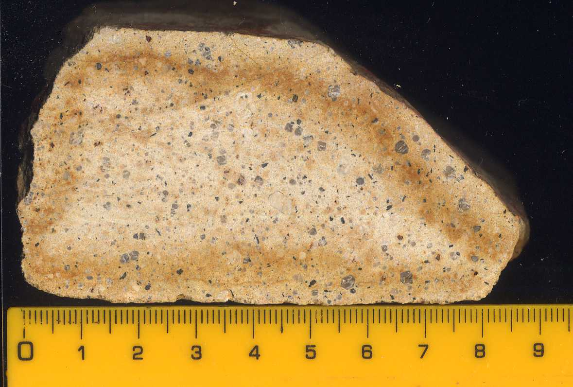 Feineporphyrischer Rotliegend Rhyolith mit Verwitterungsrinde aus dem Oberpfälzer Wald (ZEV)